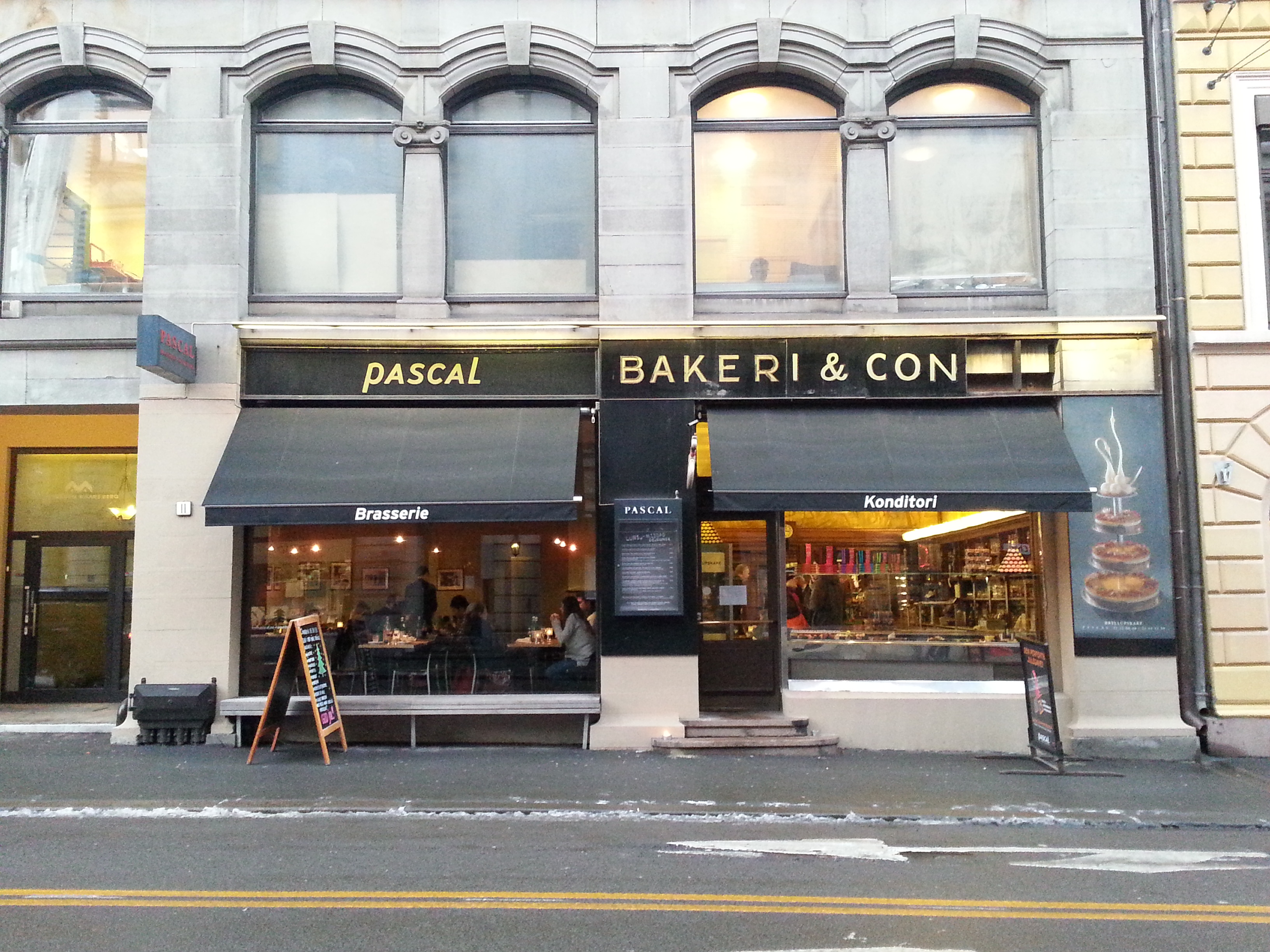 Pascal konditori i Tollbugata i Oslo.